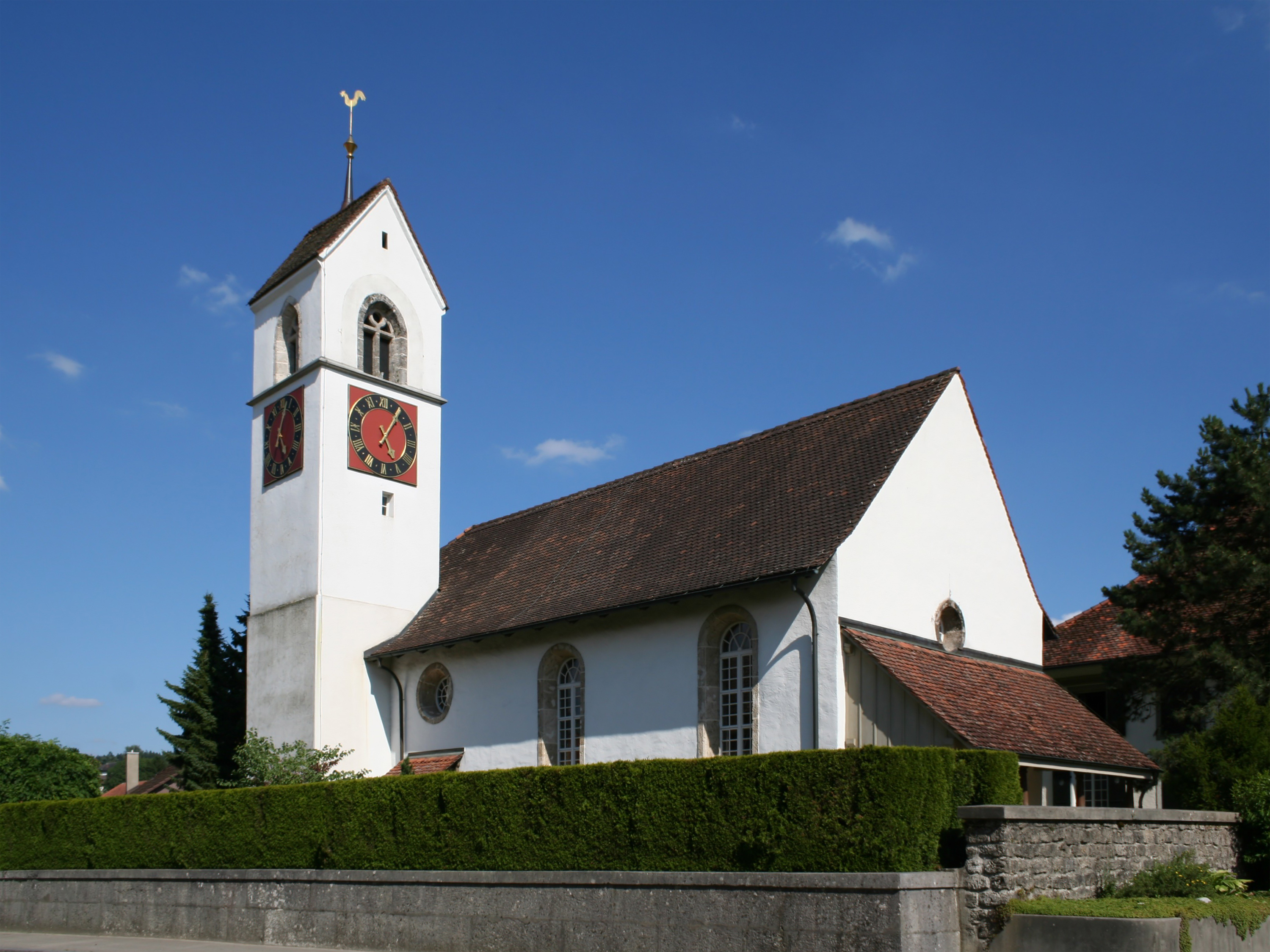 Die reformierte Kirche von Rüti bei Büren, Schweiz